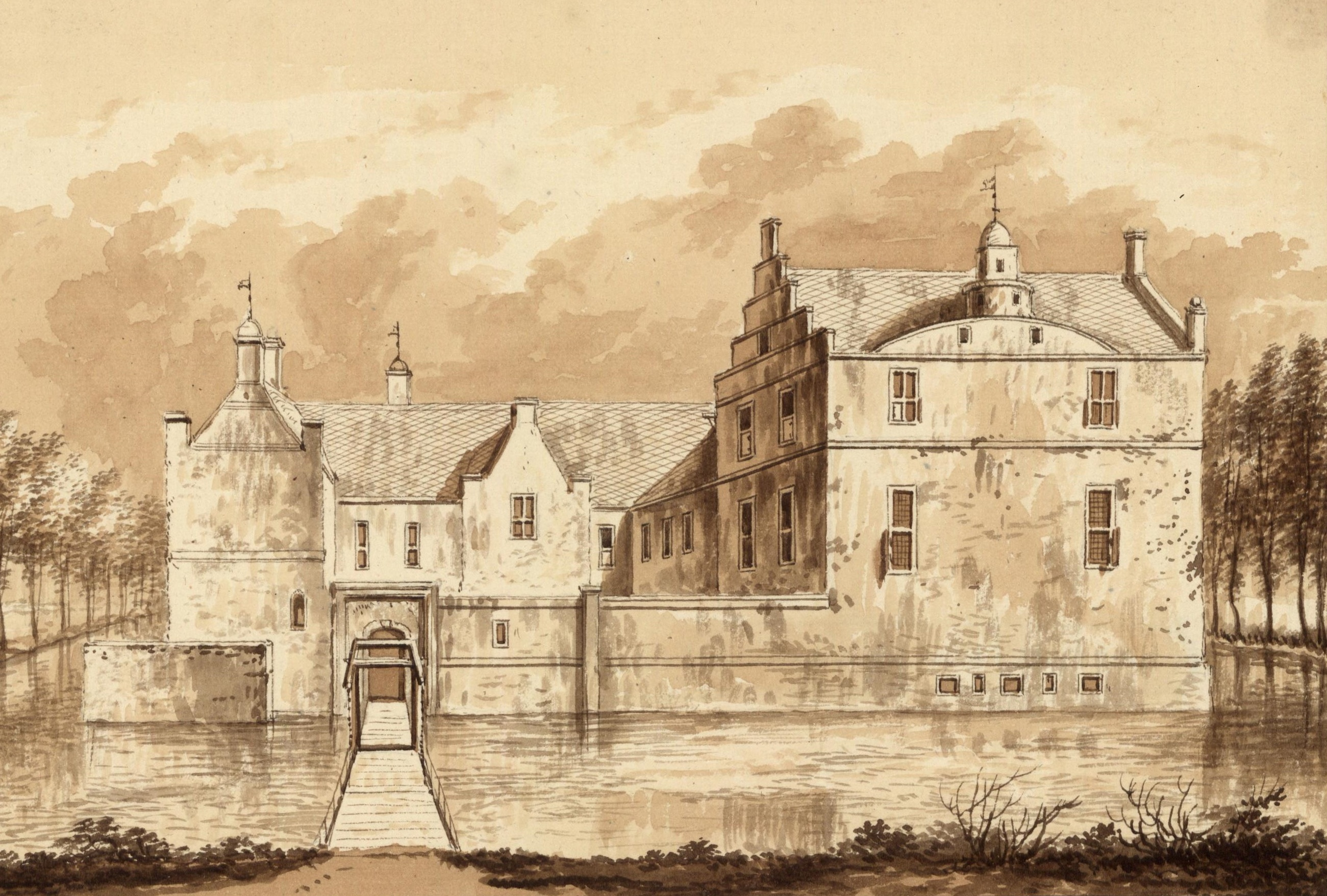 De Onstaborg te Wetsinge op een tekening van Rademaker naar een verloren gegaan origineel uit de 17e eeuw.